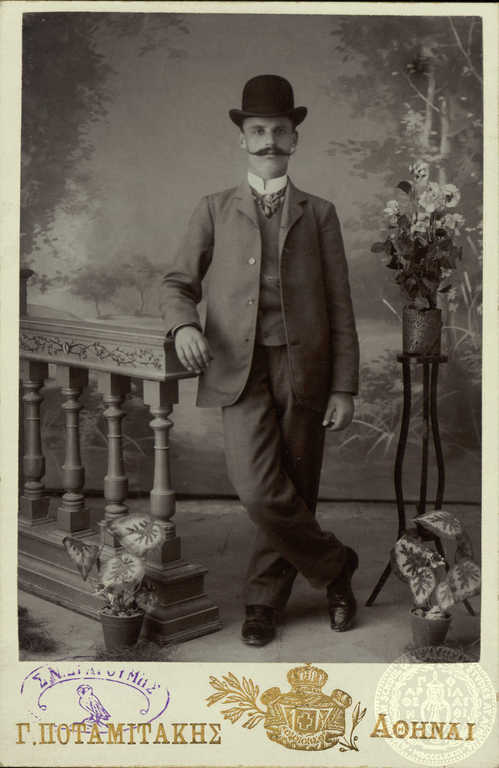 Николаос Пирзас